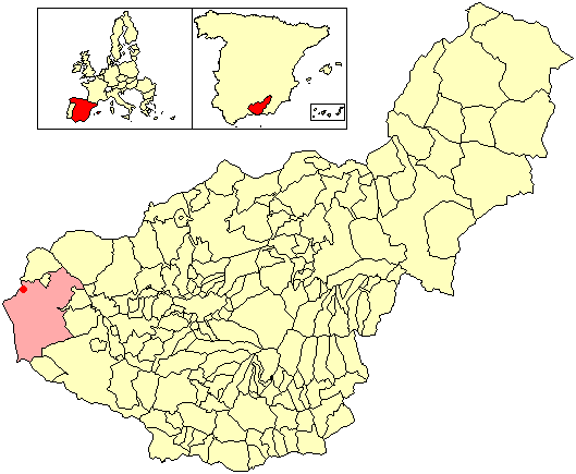 Situación de la localidad de Ventorros de Balerma (en el municipio de Loja) respecto a la provincia de Granada, en España.